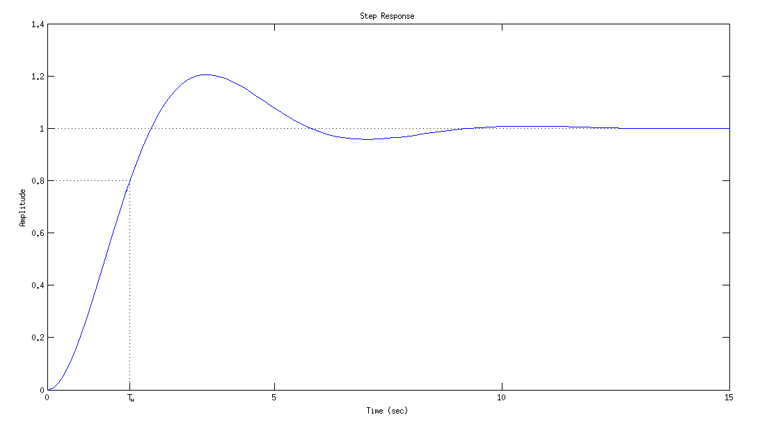 Odpowiedź układu oscylacyjnego na skok jednostkowy z zaznaczeniem czasu narastania Tn.